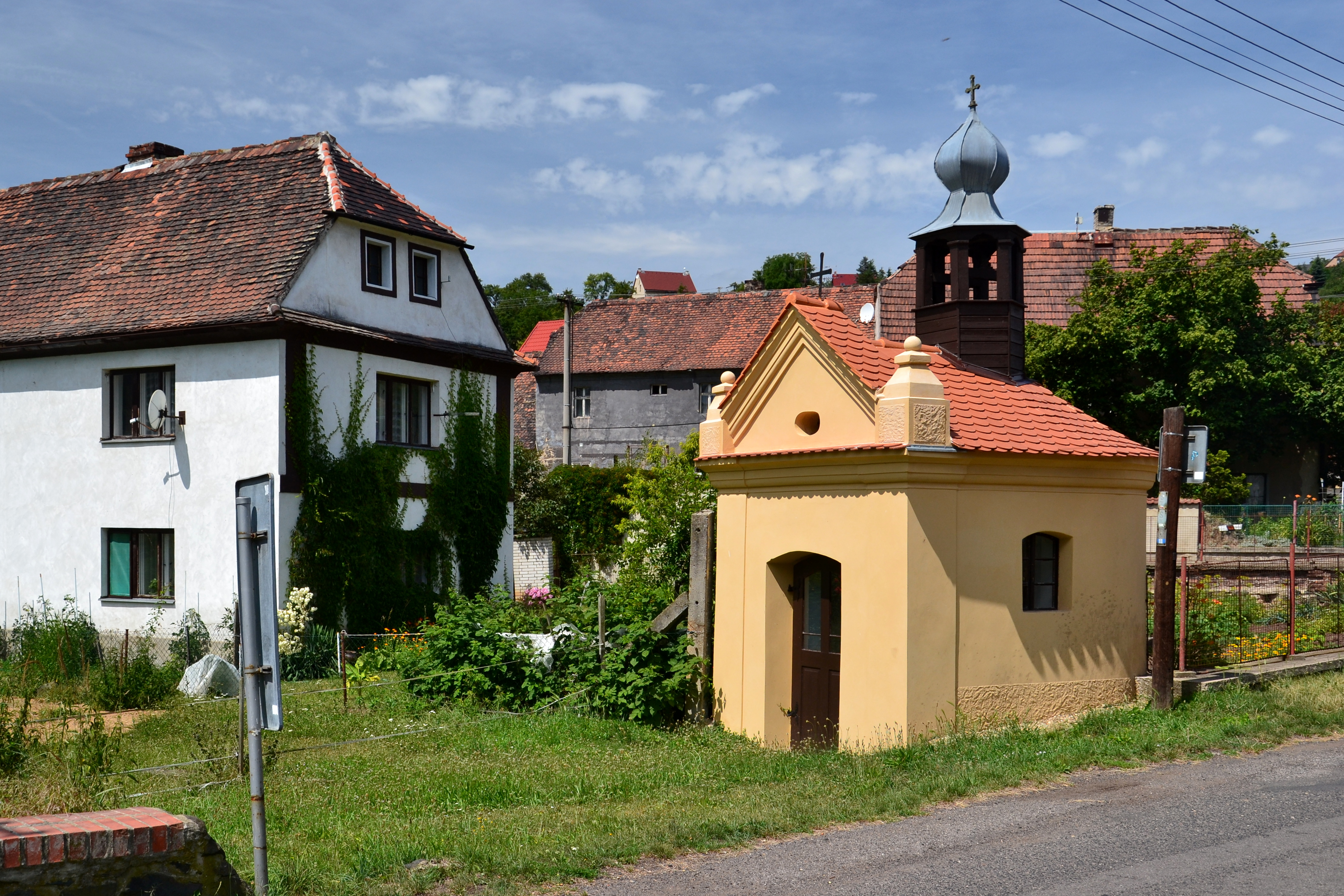 Kaplička, u mostku přes řeku Bílinu, Lbín (Bžany).